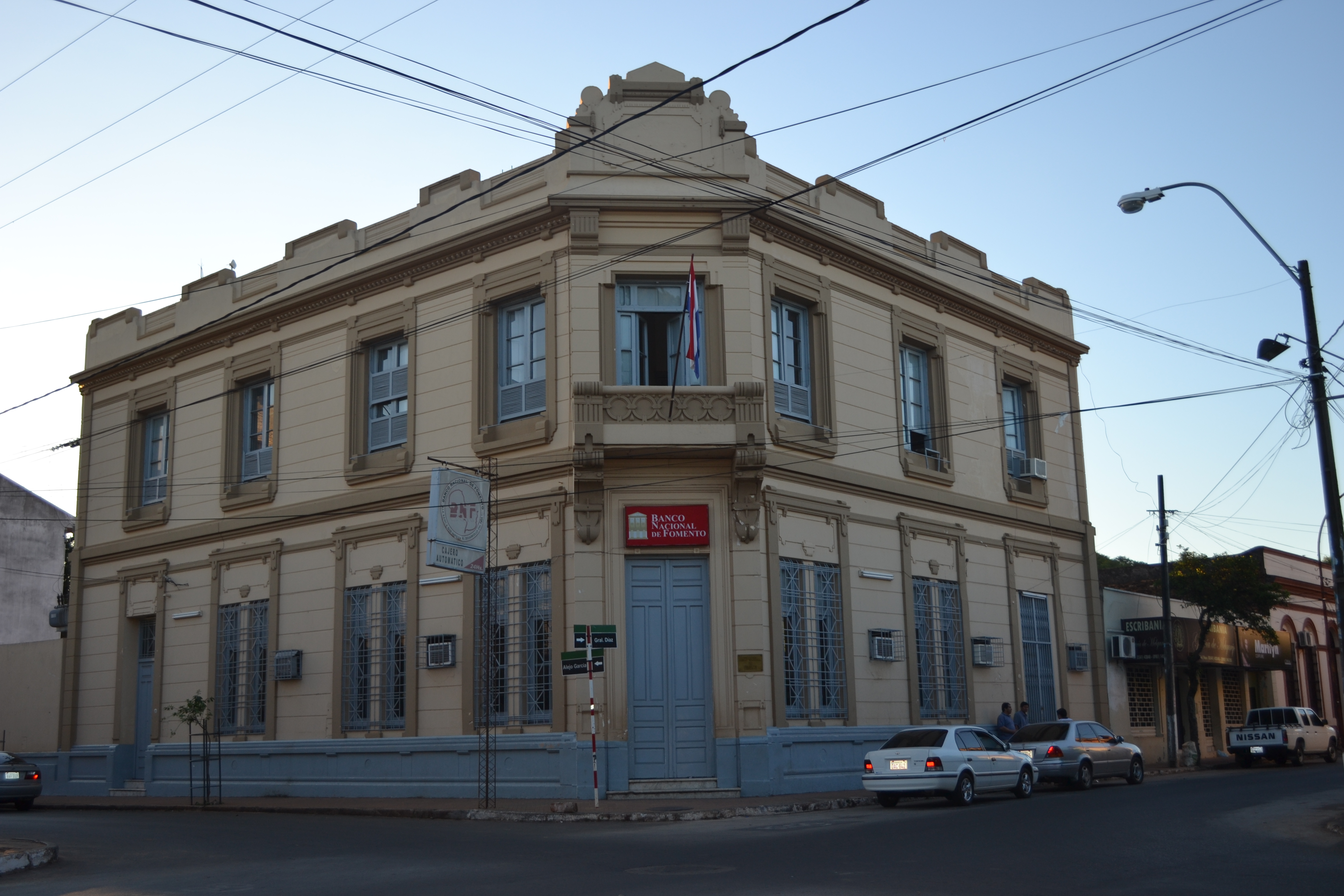 Banco de Fomento en Villarrica, Paraguay